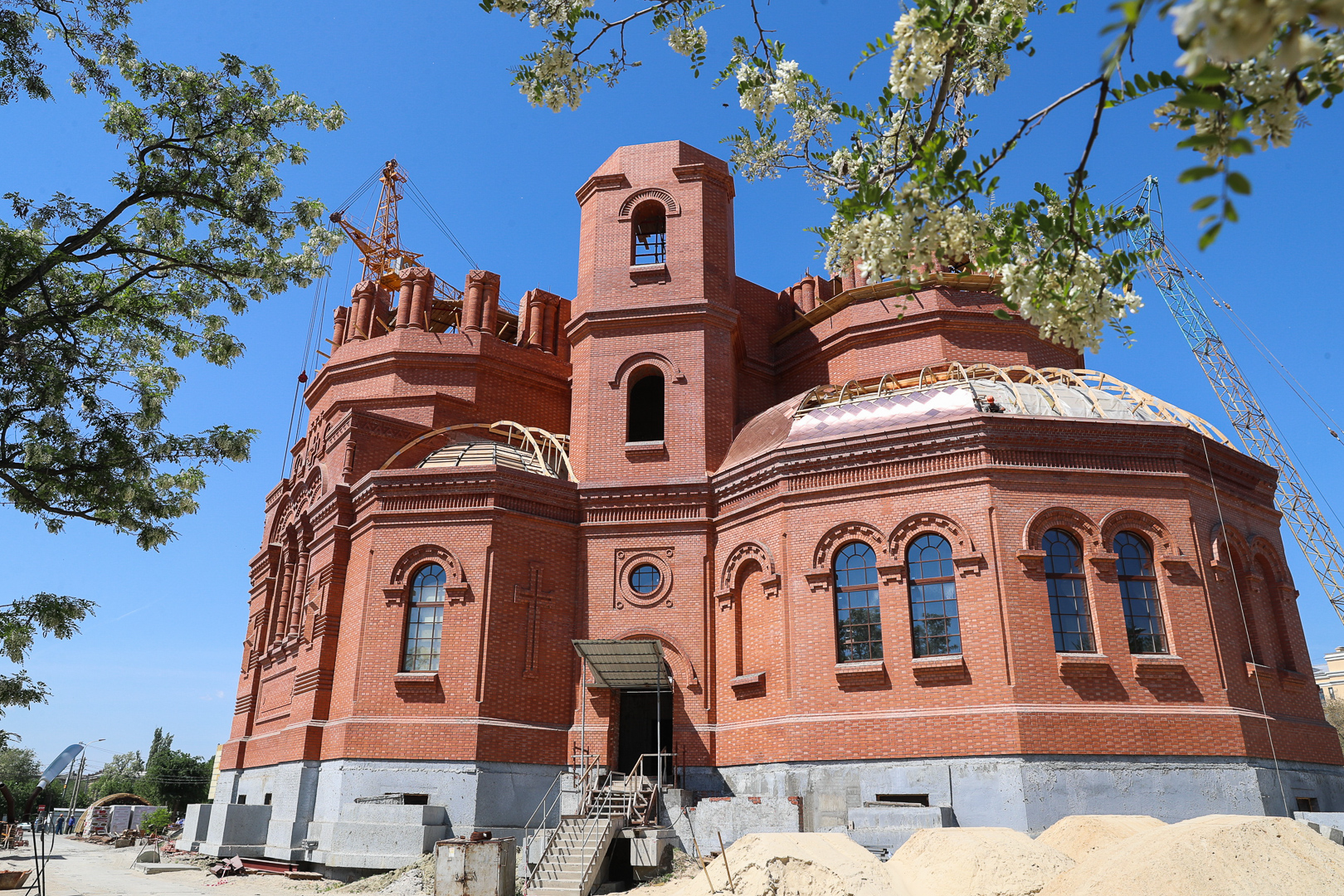 Строительство Александро-Невского собора в Волгограде на 18.05.18